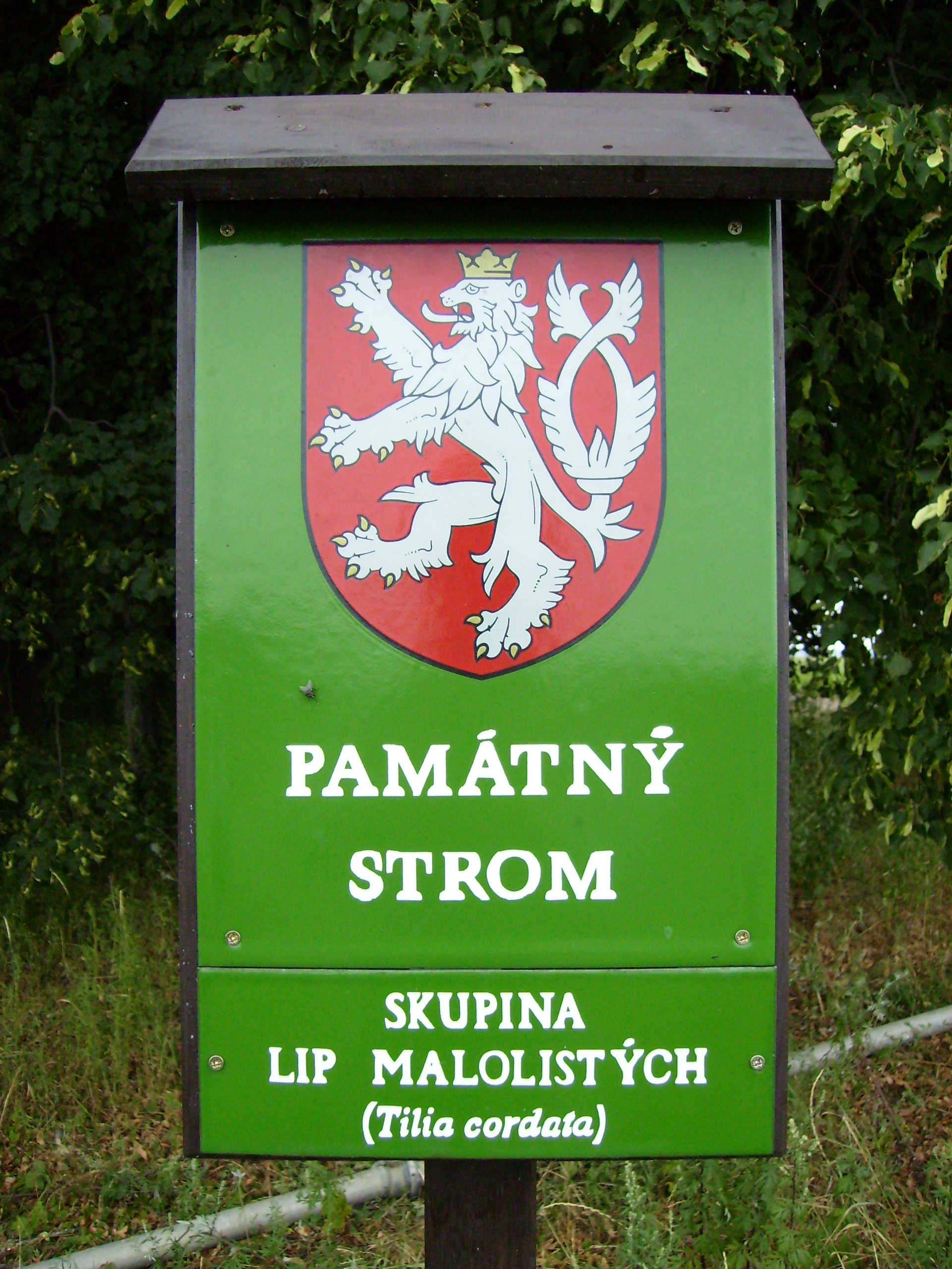 Cedule pamatný strom, památné lípy na Vrších v Přerově nad Labem.